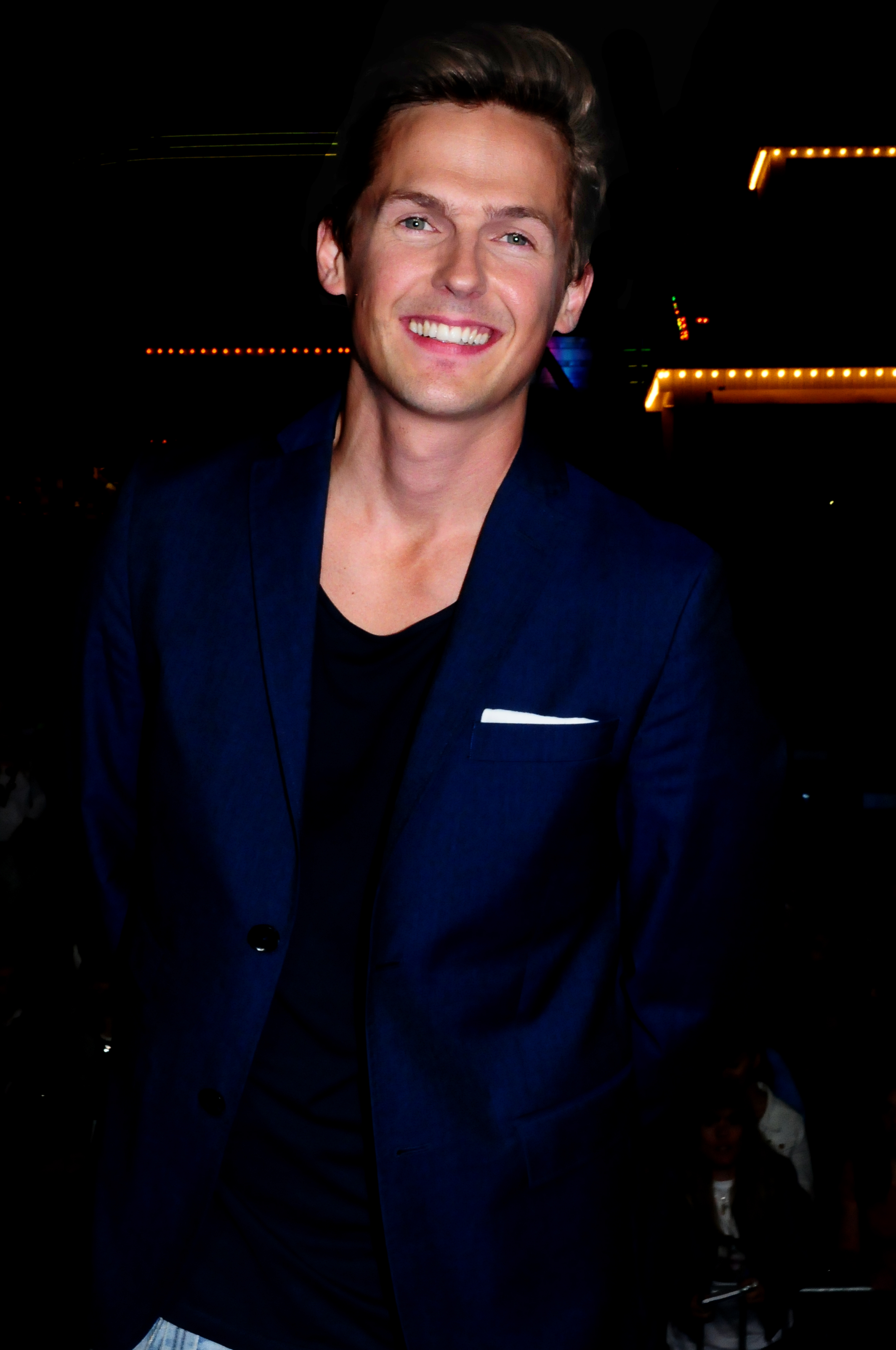 David Lindgren på Sommarkrysset på Gröna Lund, Stockholm